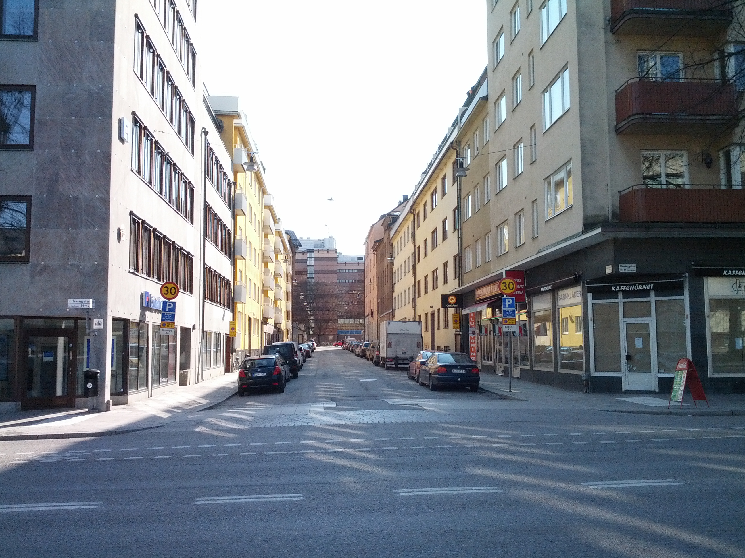 Celsiusgatan.